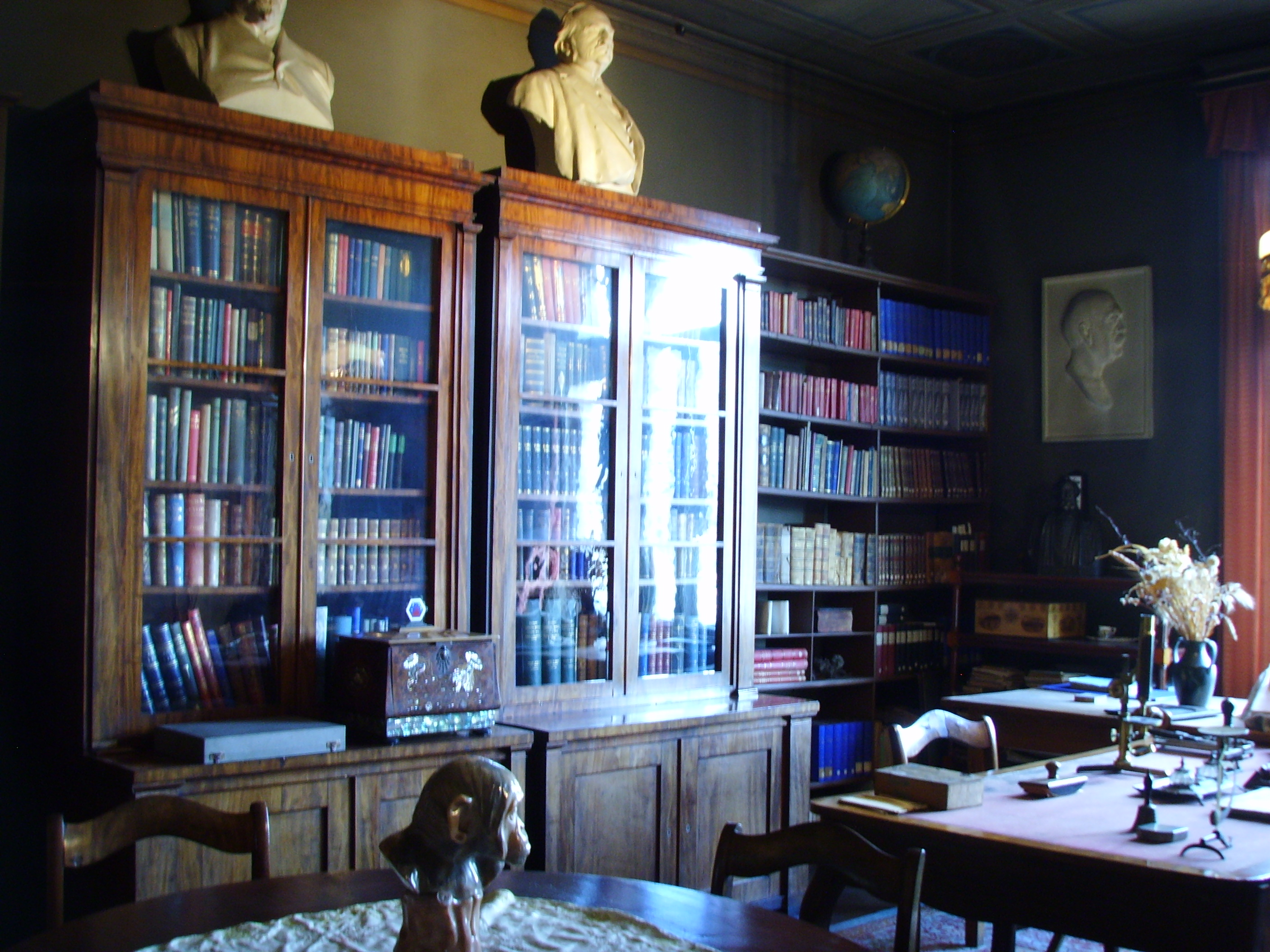 Arbeitszimmer von Ernst Haeckel, Jena